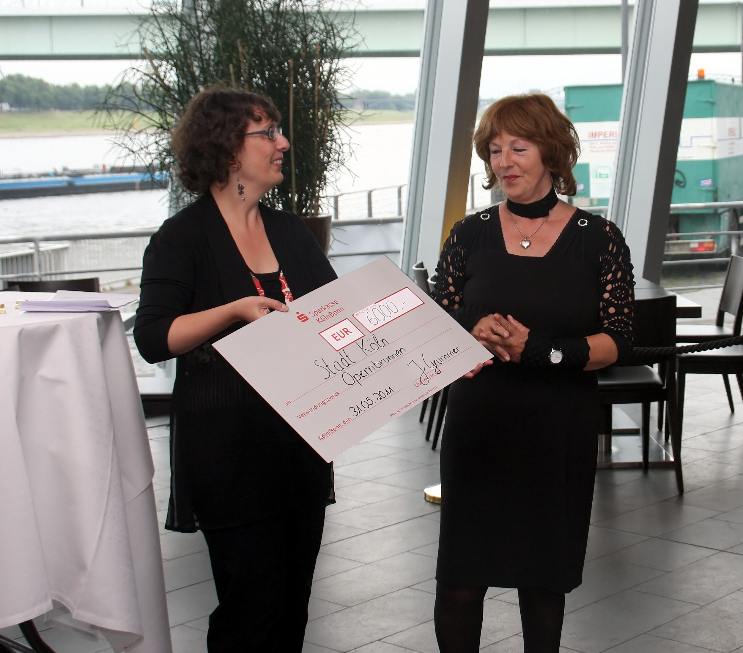 Judith Grümmer überreicht der Kölner Bürgermeisterin Angela Spizig einen Scheck über EUR 6.000 zur Restaurierung des Kölner Opernbrunnen auf dem Offenbachplatz. Die Veranstaltung fand am 31. Mai 2011 im Imhoff-Schokoladenmuseum statt.